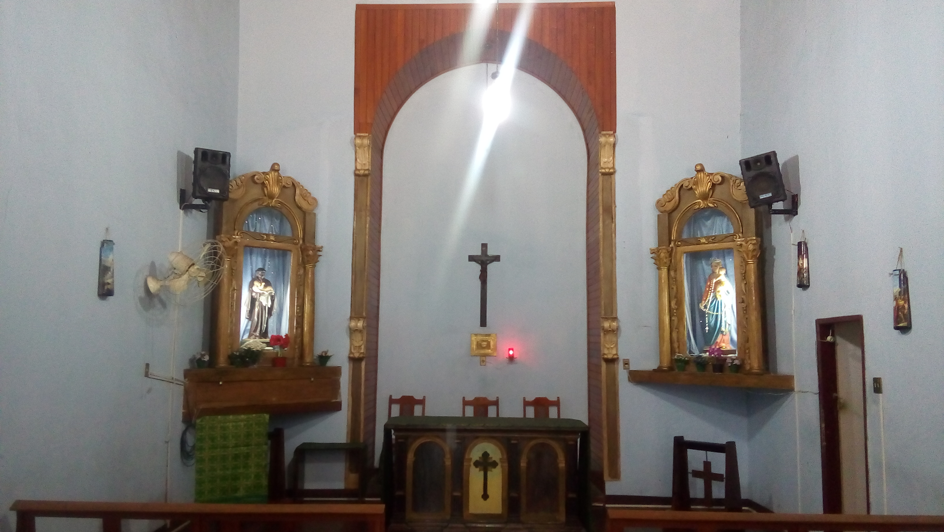 Altar da Igreja do Rosário dos Homens Pretos da Penha, em São Paulo (SP), Brasil